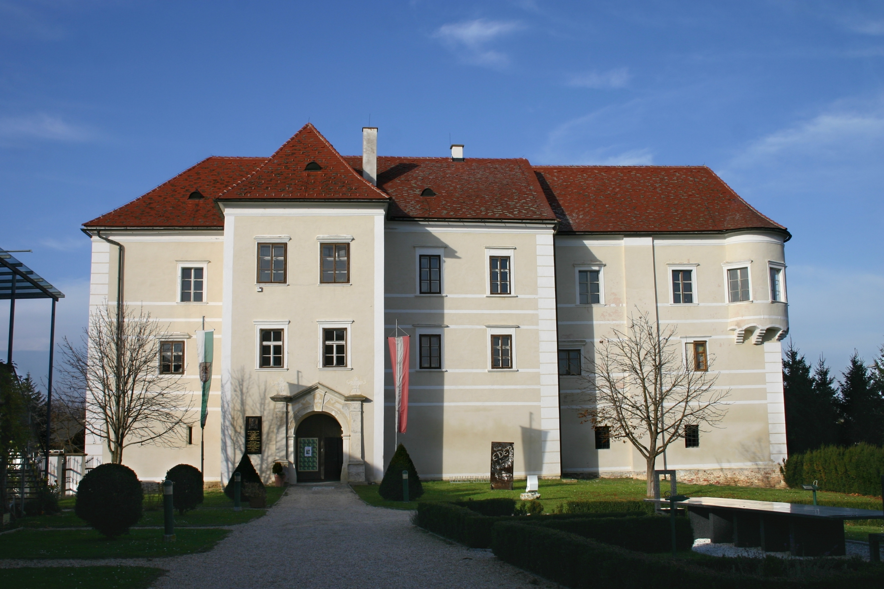 Burgau Wasserschloss